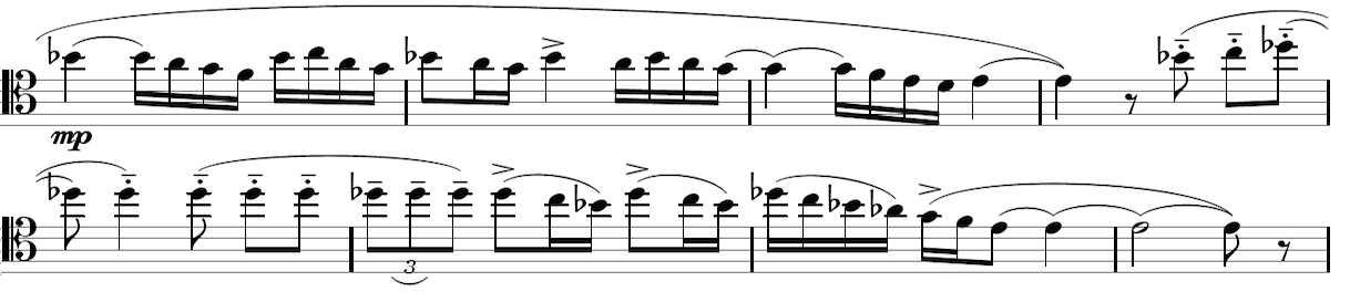 Antécédent du thème B du Boléro de Ravel